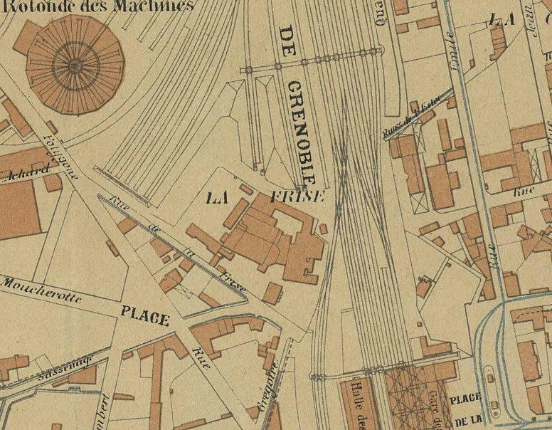 Détail plan de Grenoble (1902). Quartier de la brasserie de la Frise derière la gare.